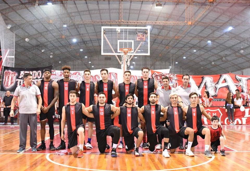 Alineacion campeona de la Superliga de Mendoza 2018